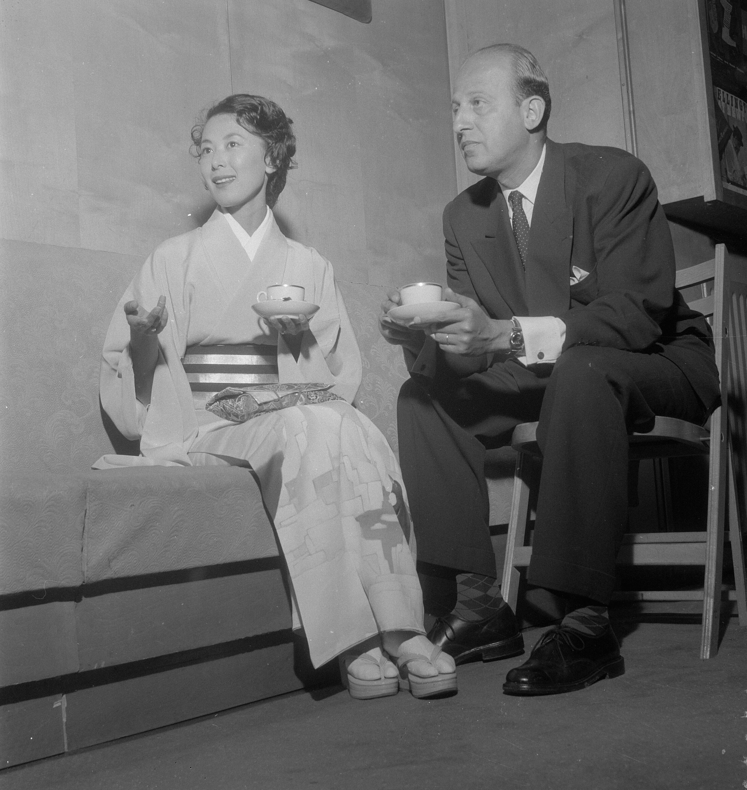 Collectie / Archief : Fotocollectie Anefo Reportage / Serie : [ onbekend ] Beschrijving : Persvoorstelling van filmechtpaar Yves Cjampi Kishi Keiko . Film "Typhoon boven Nagassaki " Floratheater Datum : 20 juni 1957 Persoonsnaam : FLORATHEATER Fotograaf : Noske, J.D. / Anefo Auteursrechthebbende : Nationaal Archief Materiaalsoort : Negatief (zwart/wit) Nummer archiefinventaris : bekijk toegang 2.24.01.03 Bestanddeelnummer : 908-6969